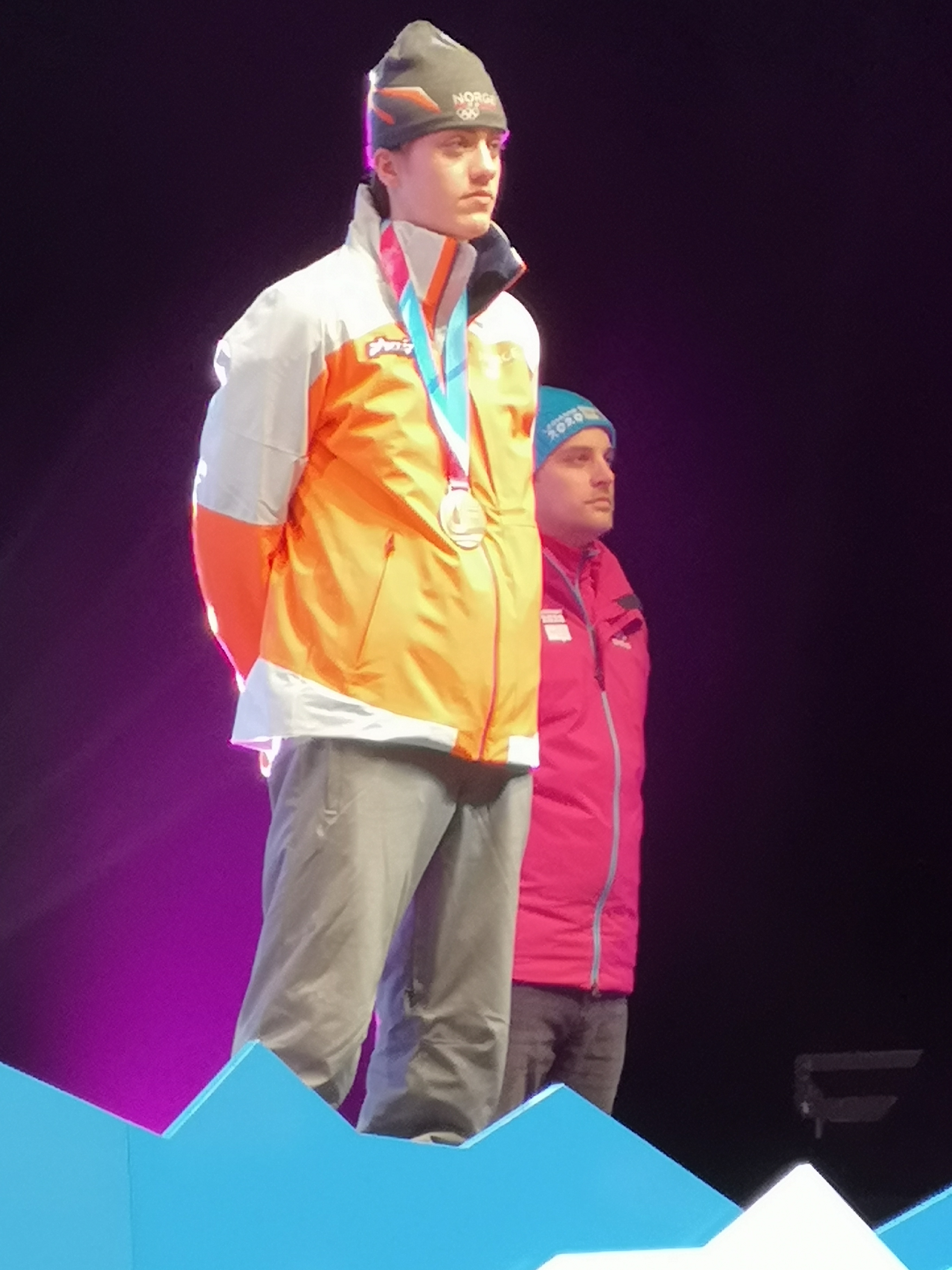 Aleksander Holmboe pendant la cérémonie de remise des médailles du sprint masculin de ski de fond des JOJ de Lausanne 2020.